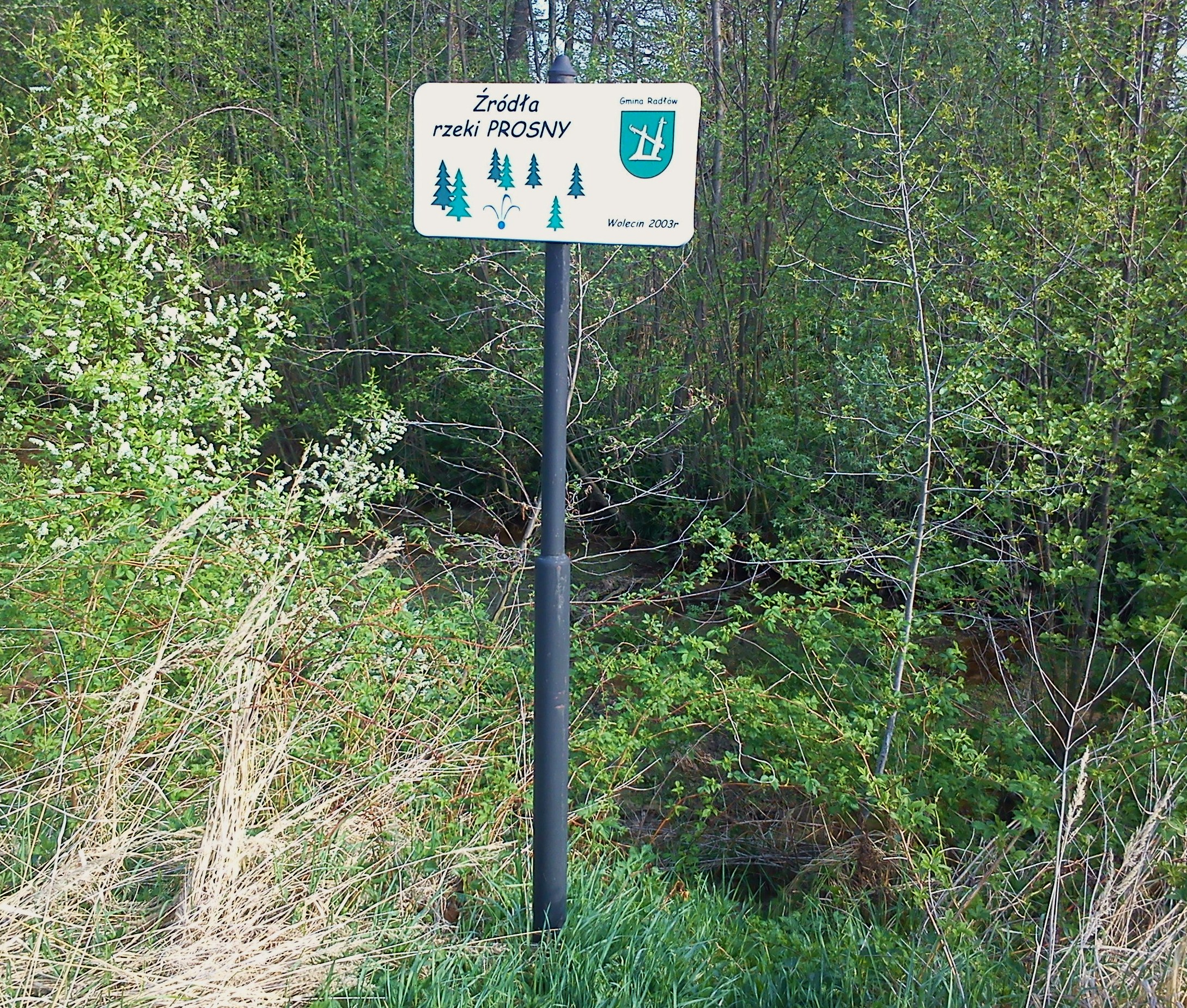 Źródło Prosny w Wolęcinie.